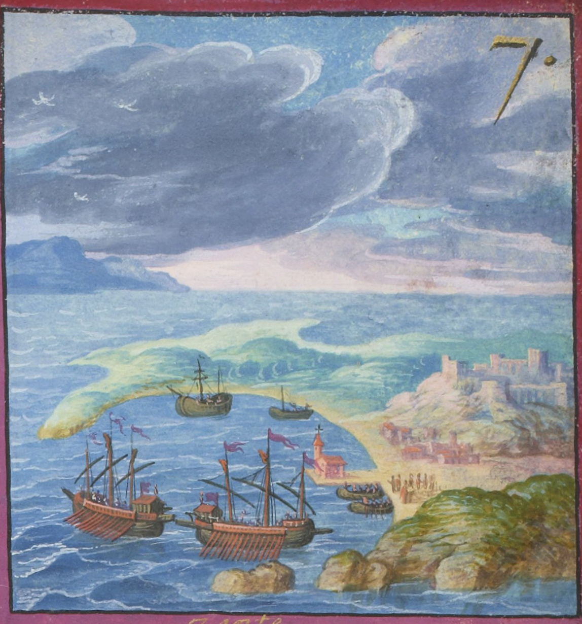 Voyages et aventures de Ch. Magius, Bibliothèque nationale de France, département Estampes et photographie, RESERVE 4-AD-134, detail de la miniature no. 7: forteresse et port de Zante (Zakynthos)